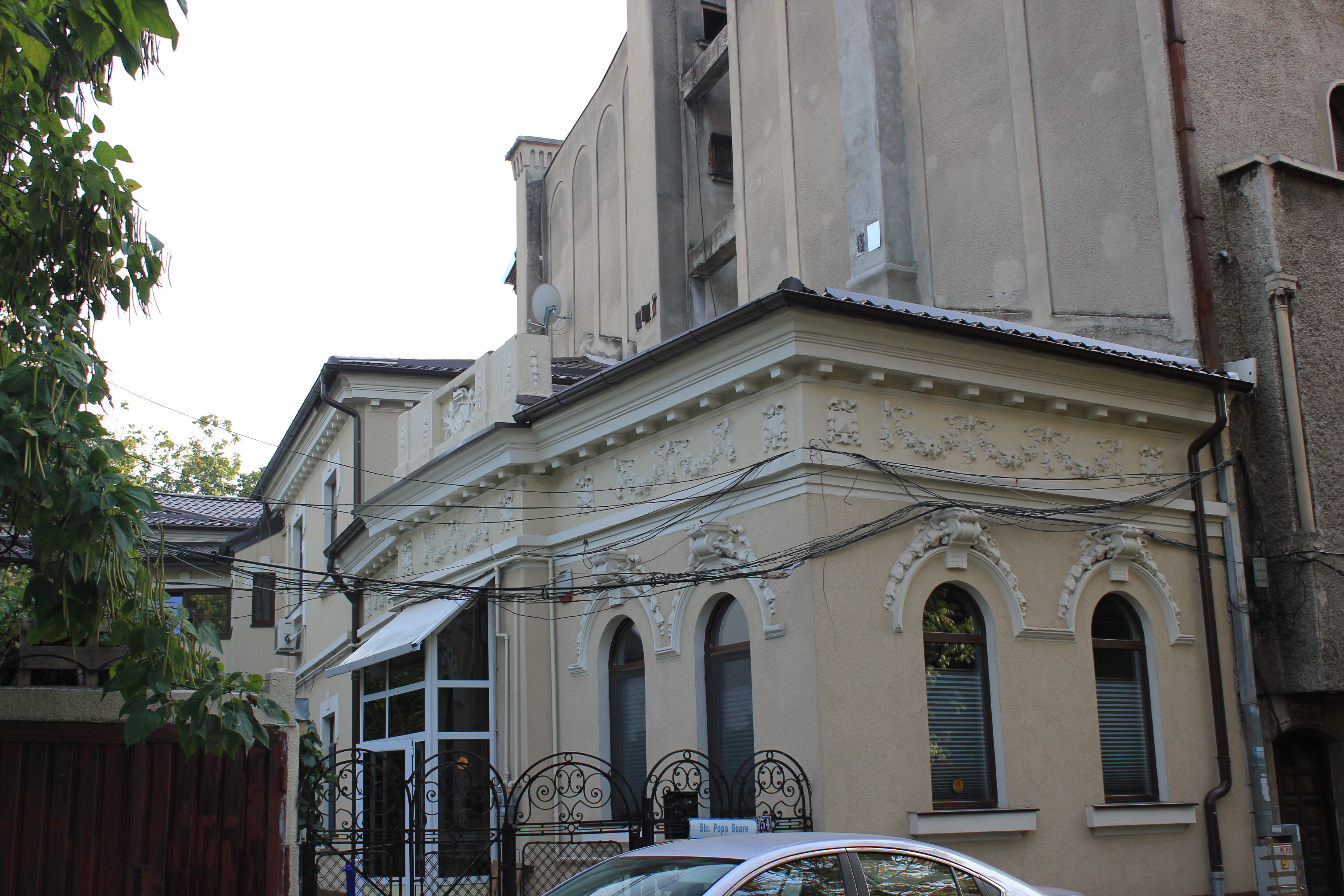 Casă Popa Soare 54